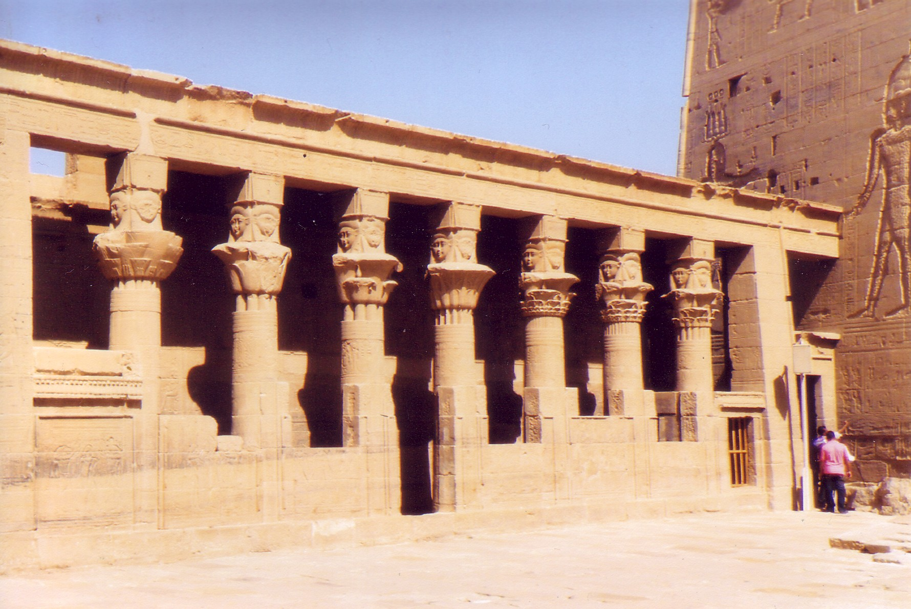 Tempio di Iside (isola di Philae), il Mammisi di Horus